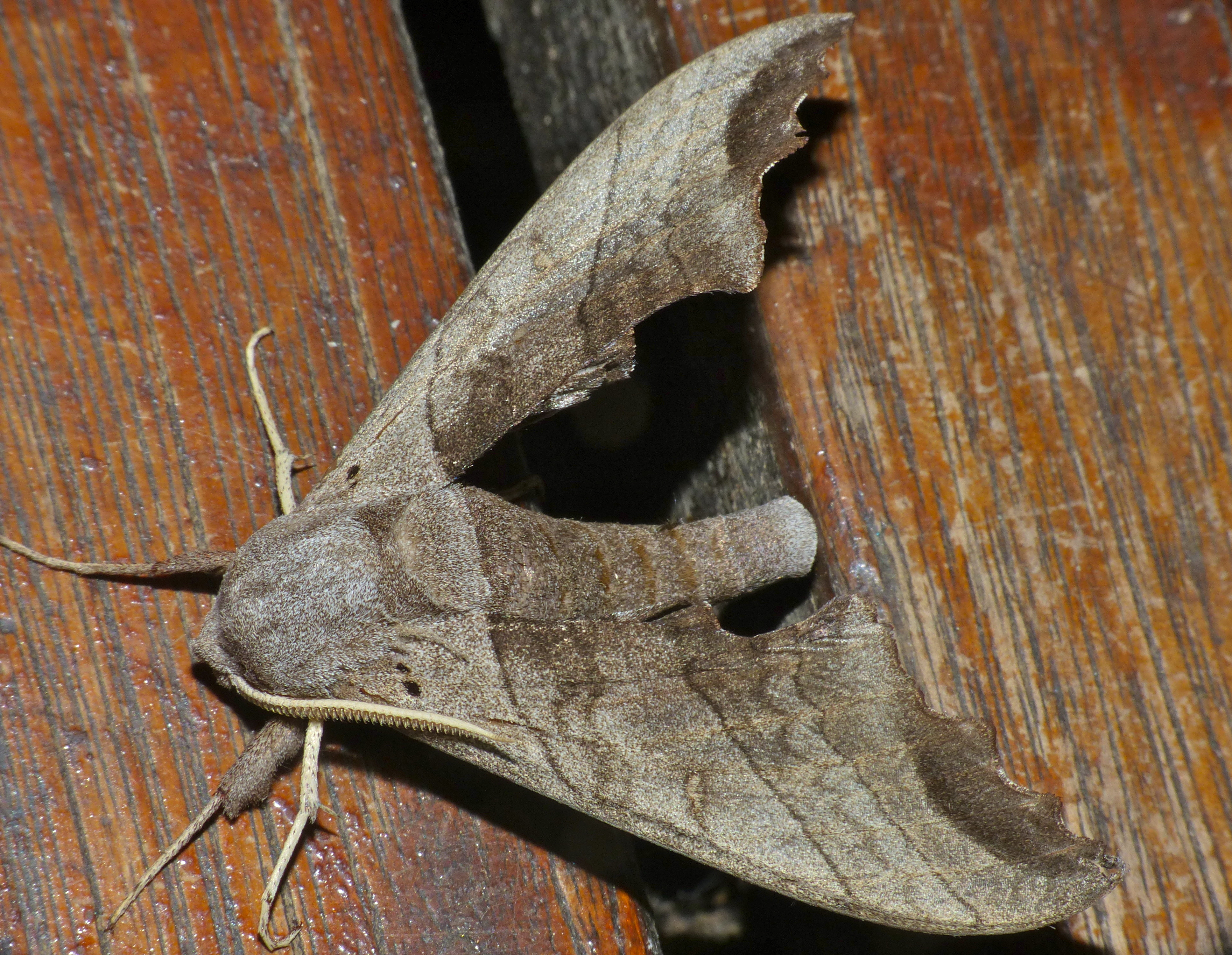 Safari Tent N°27, Tamboti Tented Camp, Kruger NP, SOUTH AFRICA